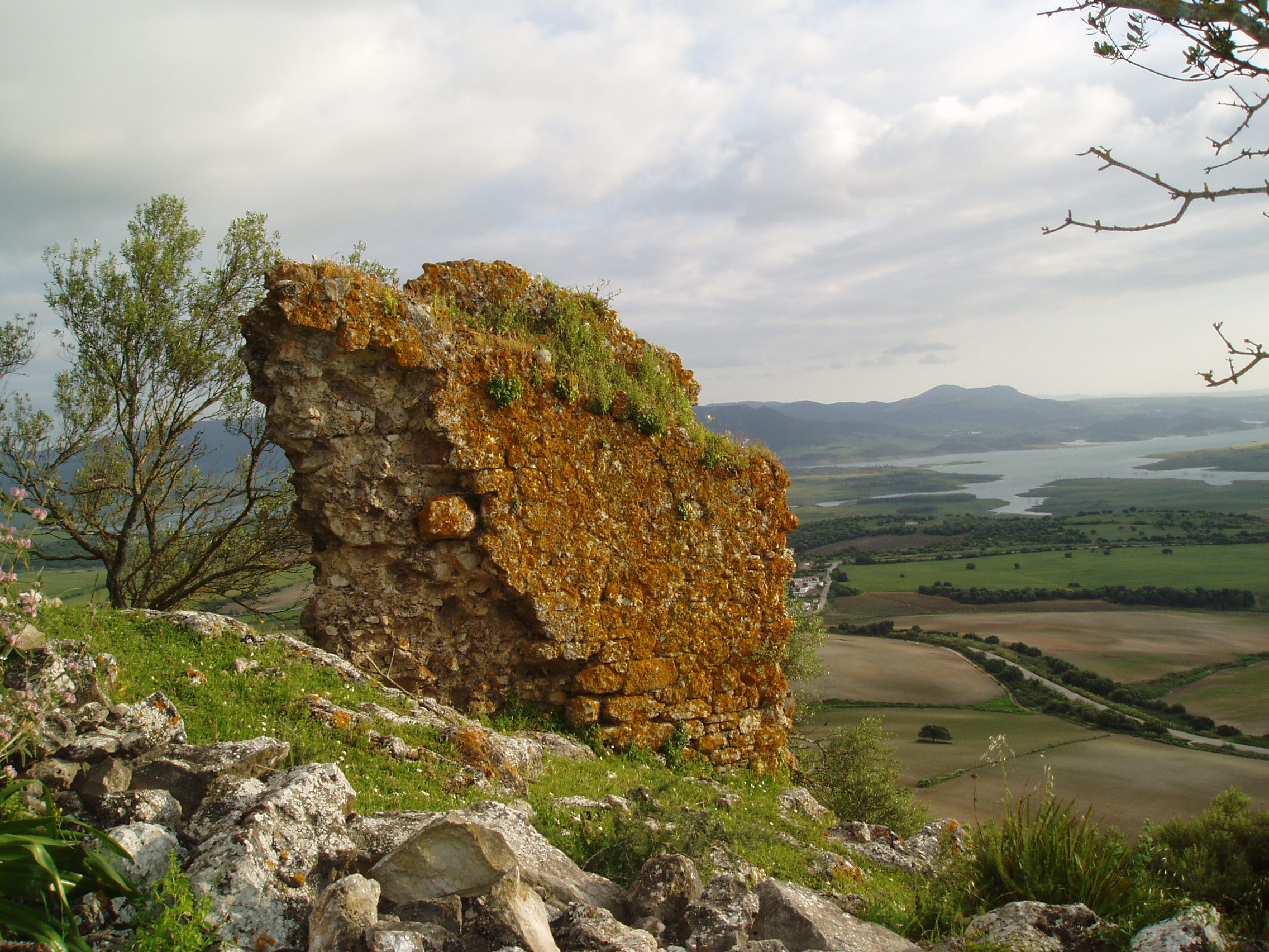 Restos hispanorromanos en Calduba, Sierra de Aznar (Arcos de la Frontera).